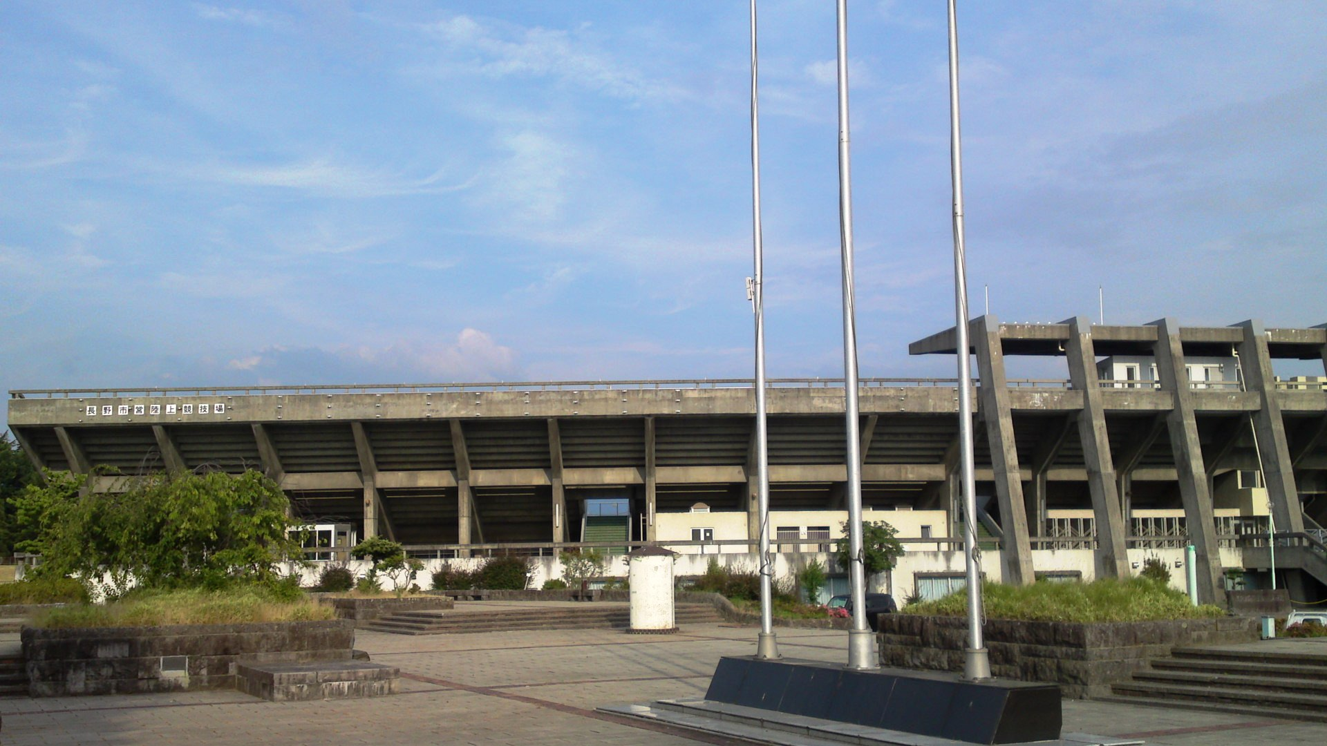 長野市営陸上競技場（長野県長野市）